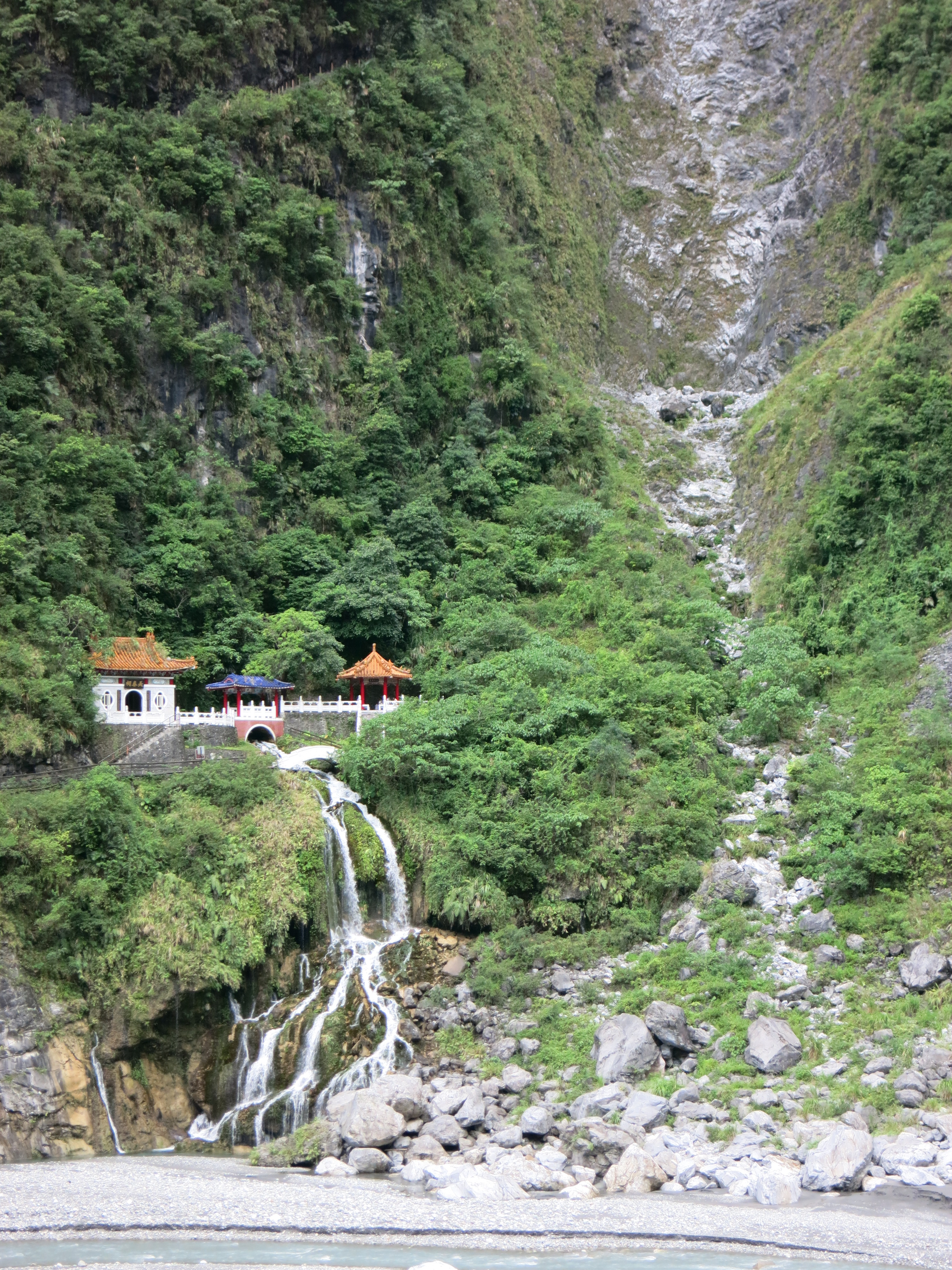 長春祠と岩壁